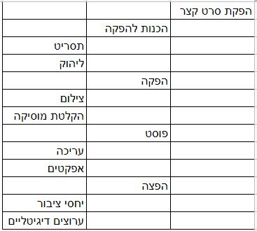 WBS במבנה טבלה